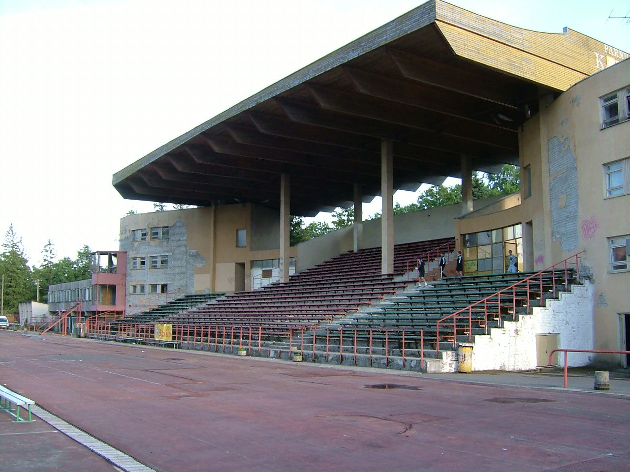 Pärnu Kalevi Staadion in 2007